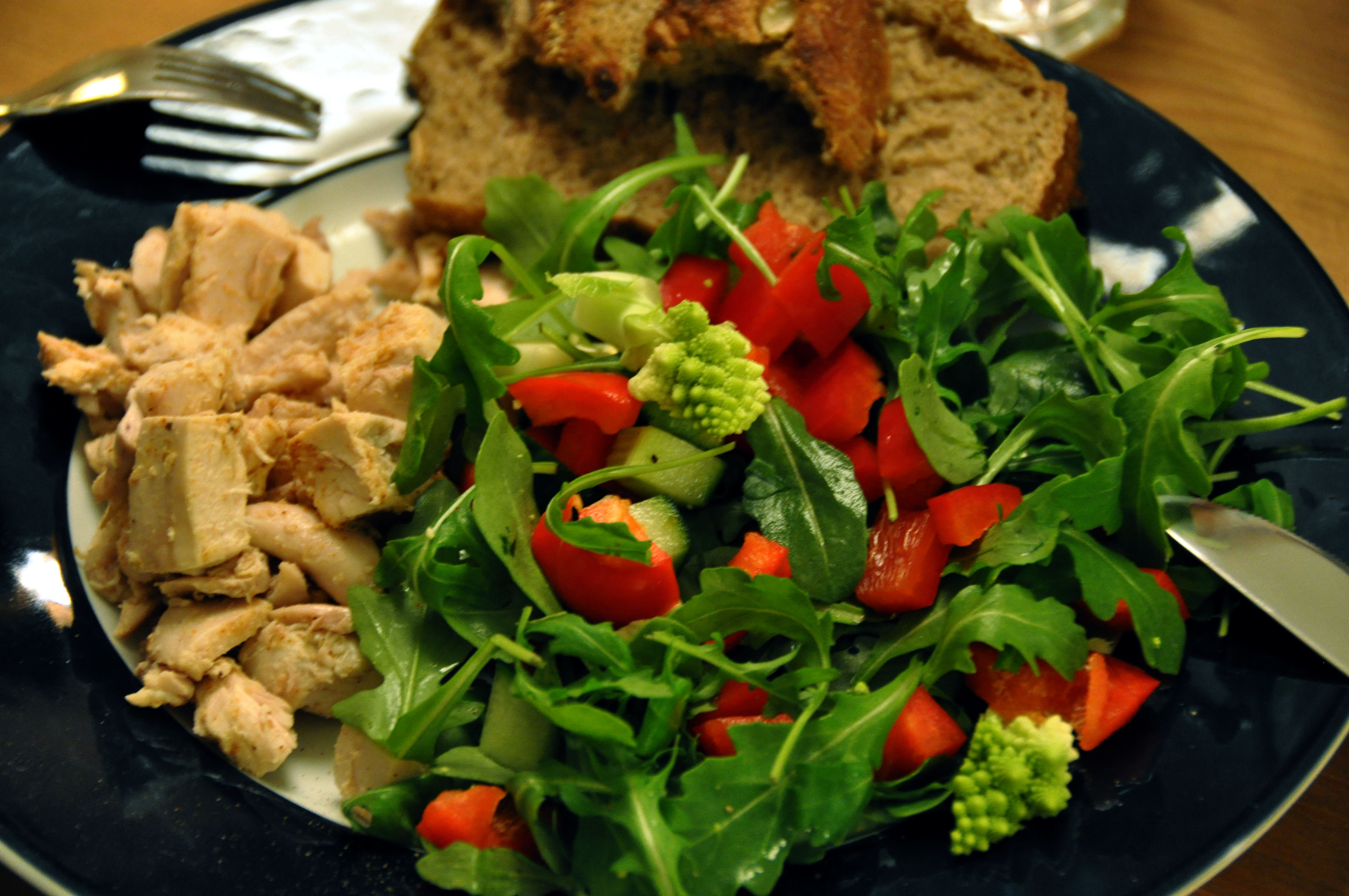 Kylling, brød og salat af rucola, rød peber og romanesco